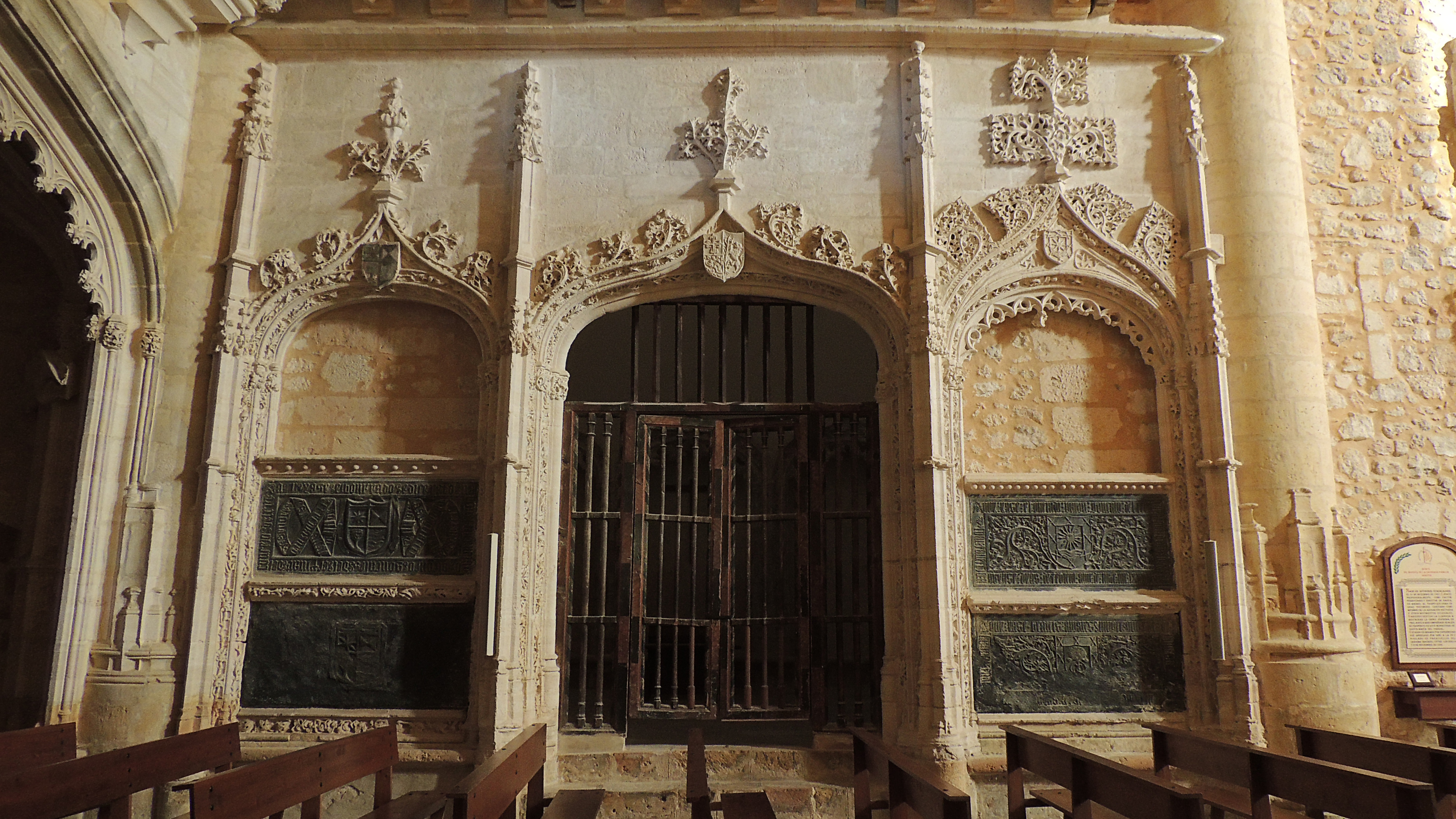 Monasterio de Santa María del Parral - Capilla de la Asunción